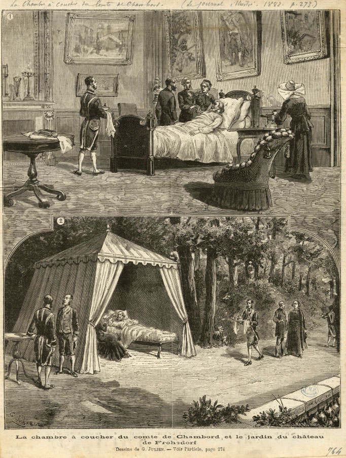 La chambre à coucher du comte de Chambord et le jardin du château de Frohsdorf